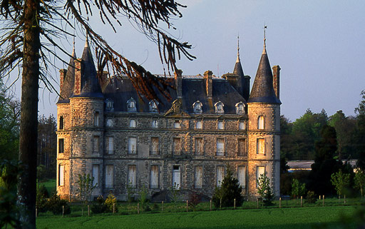 Château de Coat an noz (22)